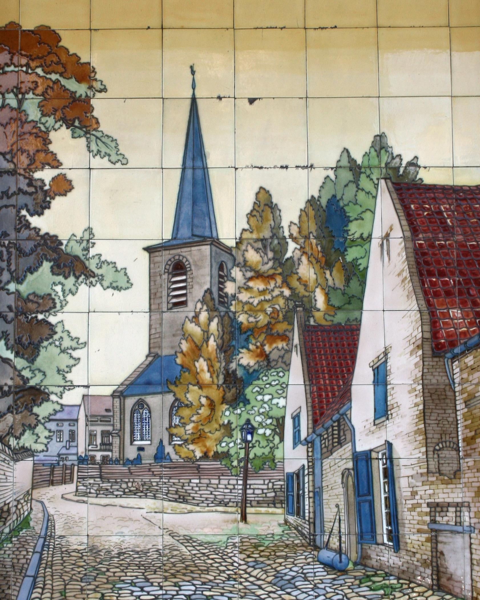 53-61 avenue Louis Bertrand, Schaerbeek (Bruxelles). Architecte: Gustave Strauven. Détail: panneau de céramiques représentant l'ancienne église Saint-Servais détruite lors du percement de l'avenue Louis Bertrand